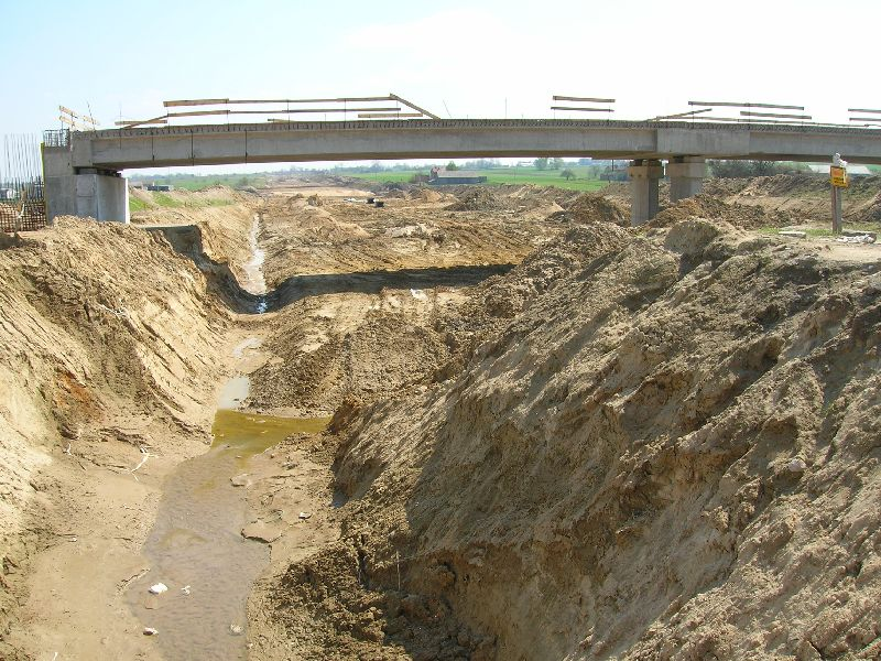 Budowa autostrady A-2 - okolice Zelgoszczy.